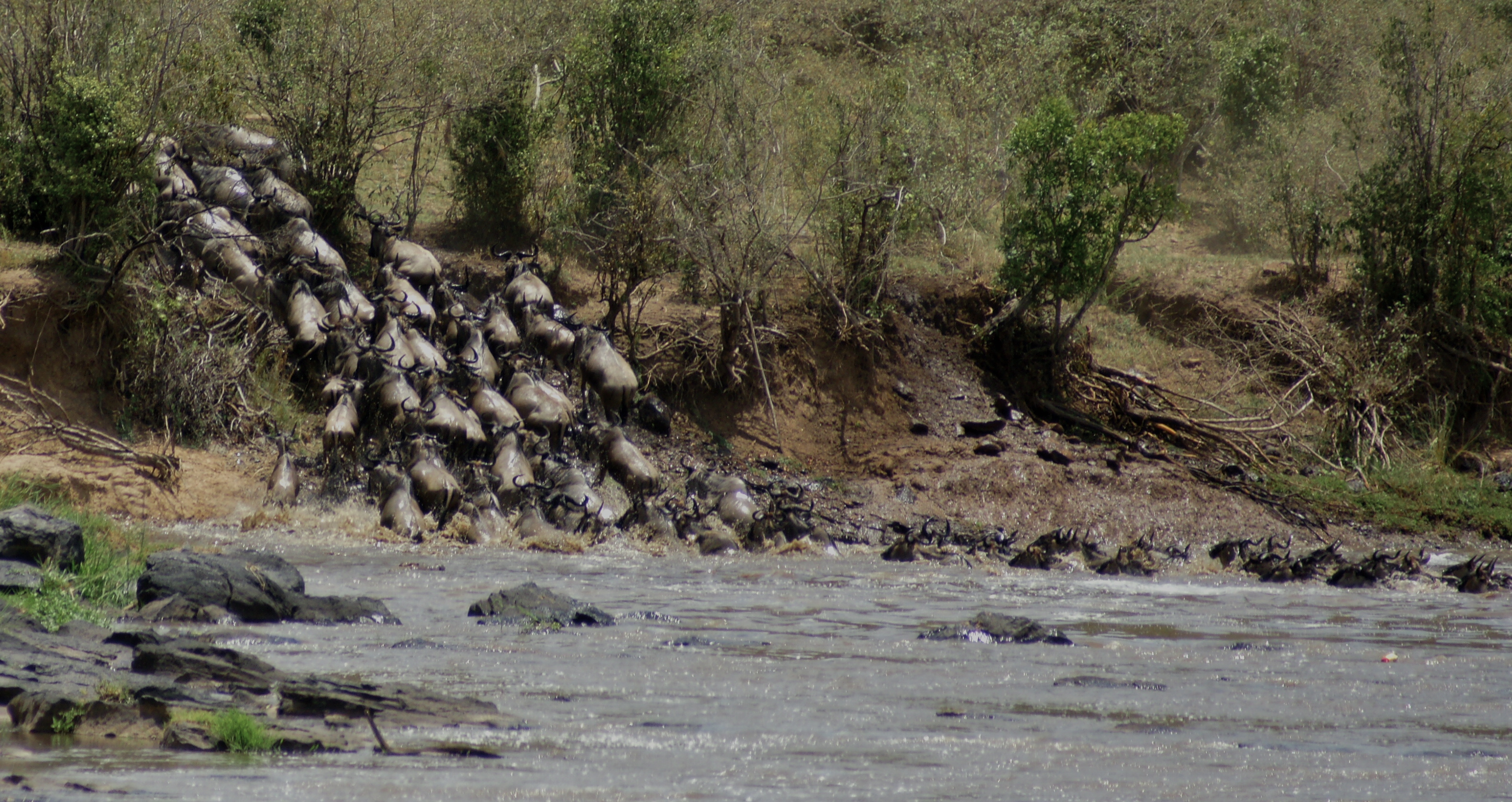 Maasai Mara - 060